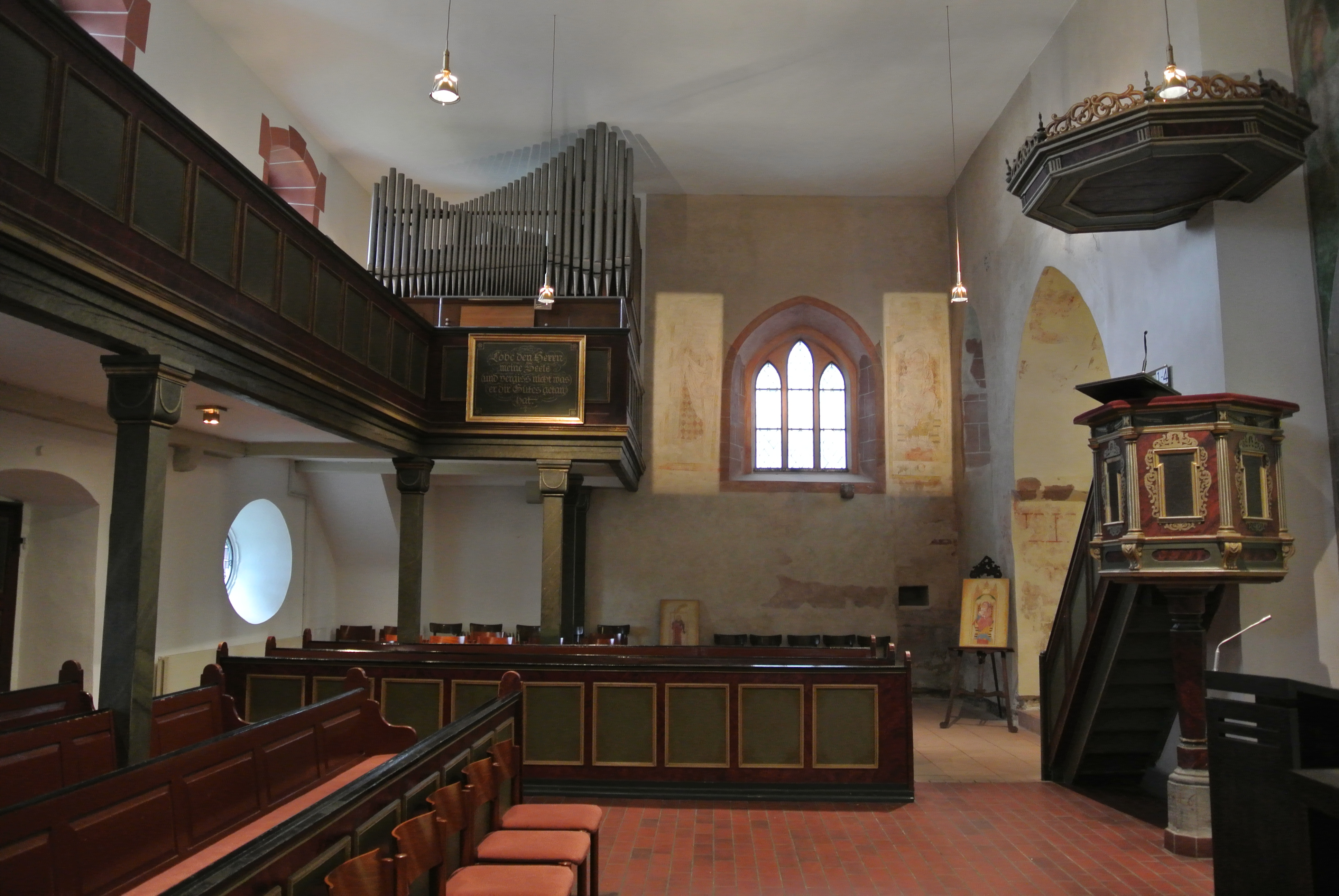 Evangelische Kreuzkirche in Frankfurt-Preungesheim, barocke Saalkirche von 1716 mit gotischen Elementen auf romanischen Fundamenten